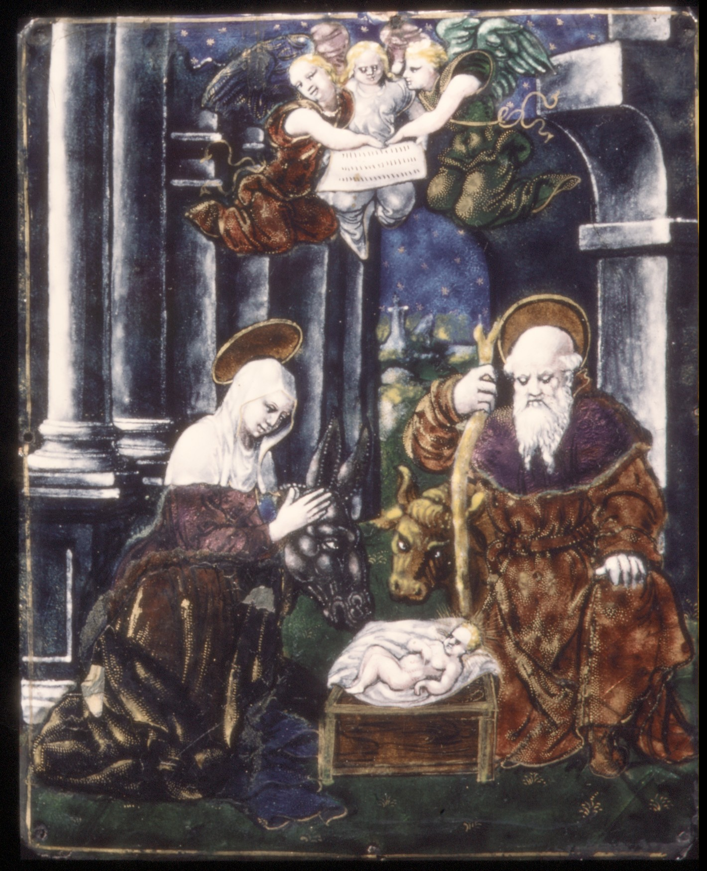 French, Limoges; Plaque; Enamels